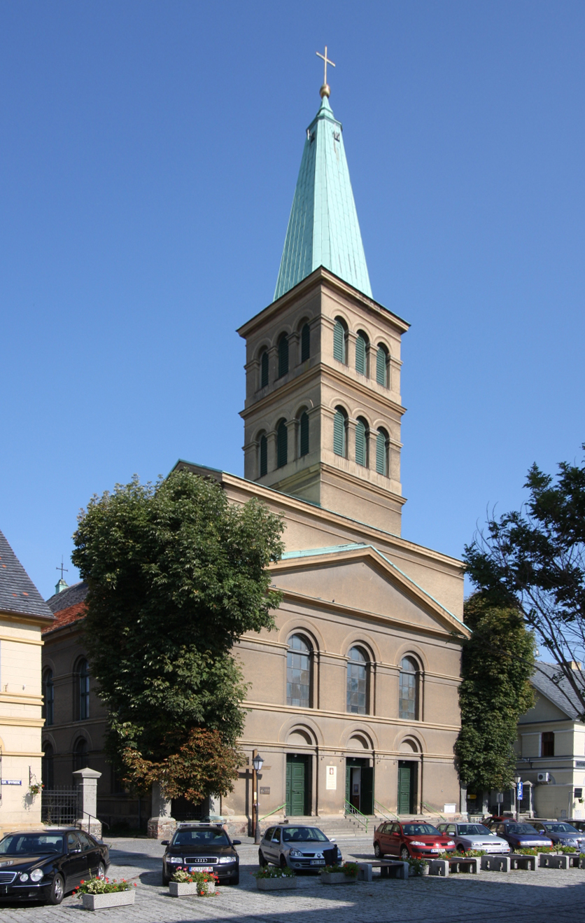 Międzyrzecz, kościół ewangelicki. ob. rzym.-kat. fil. p.w. św. Wojciecha, mur., 1834